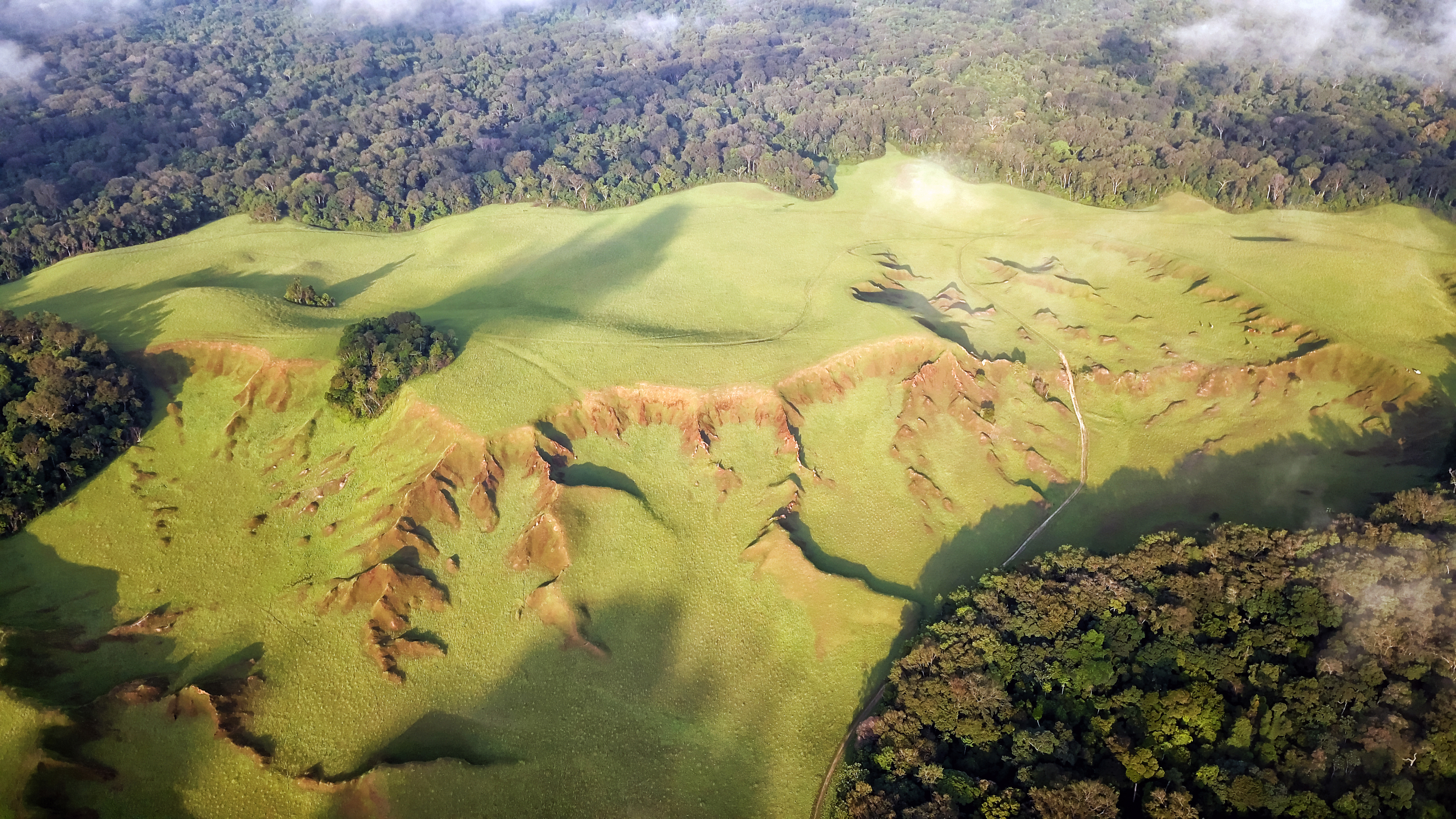 novembre 2017, drone utilisé modèle DJI Mavic pro, photographie de La plaine aux images région de Nyonié au Gabon. Mosaïque de la forêt-savane Gabonaise. This is an image with the theme "Play" from: Gabon